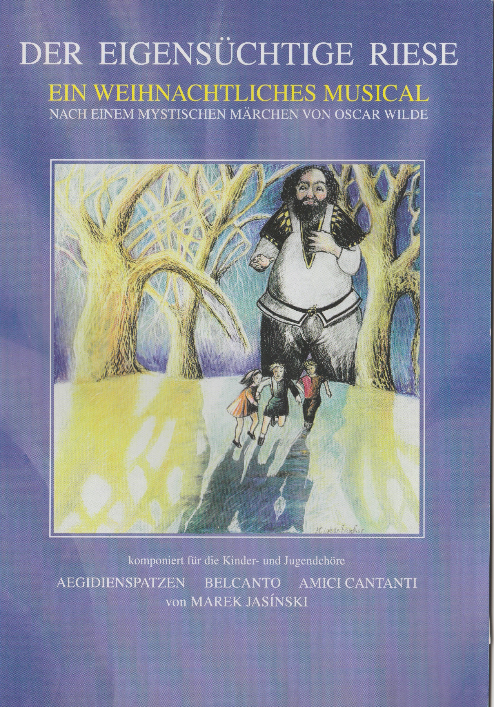 Programmheft zum Musical "Der eigensüchtige Riese" des Jugendchors Belcanto Braunschweig